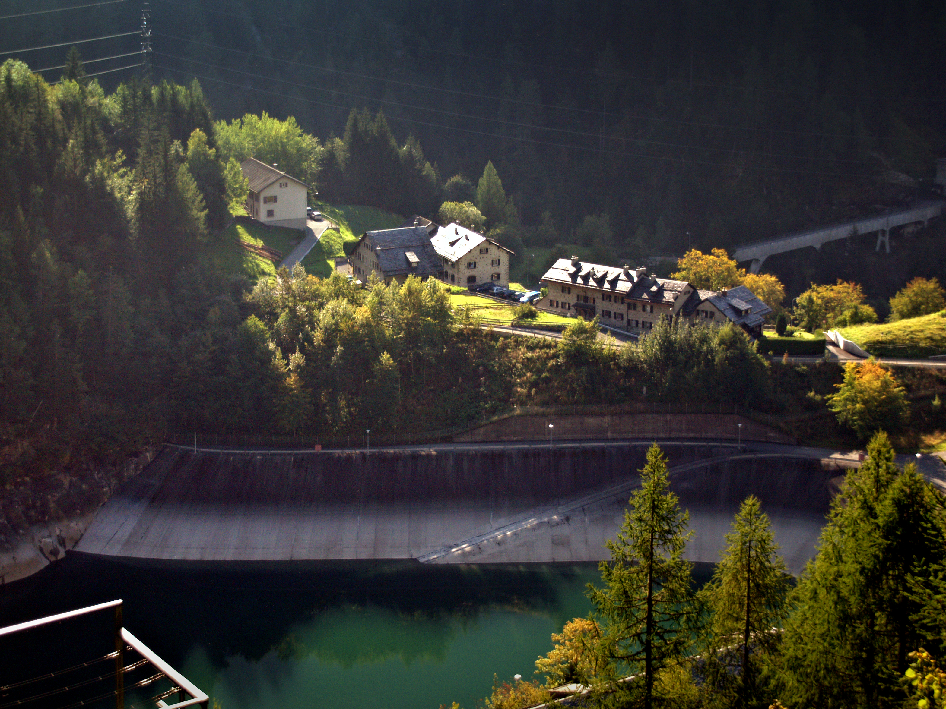 Finhaut, Valais (Suisse) - Le Châtelard village